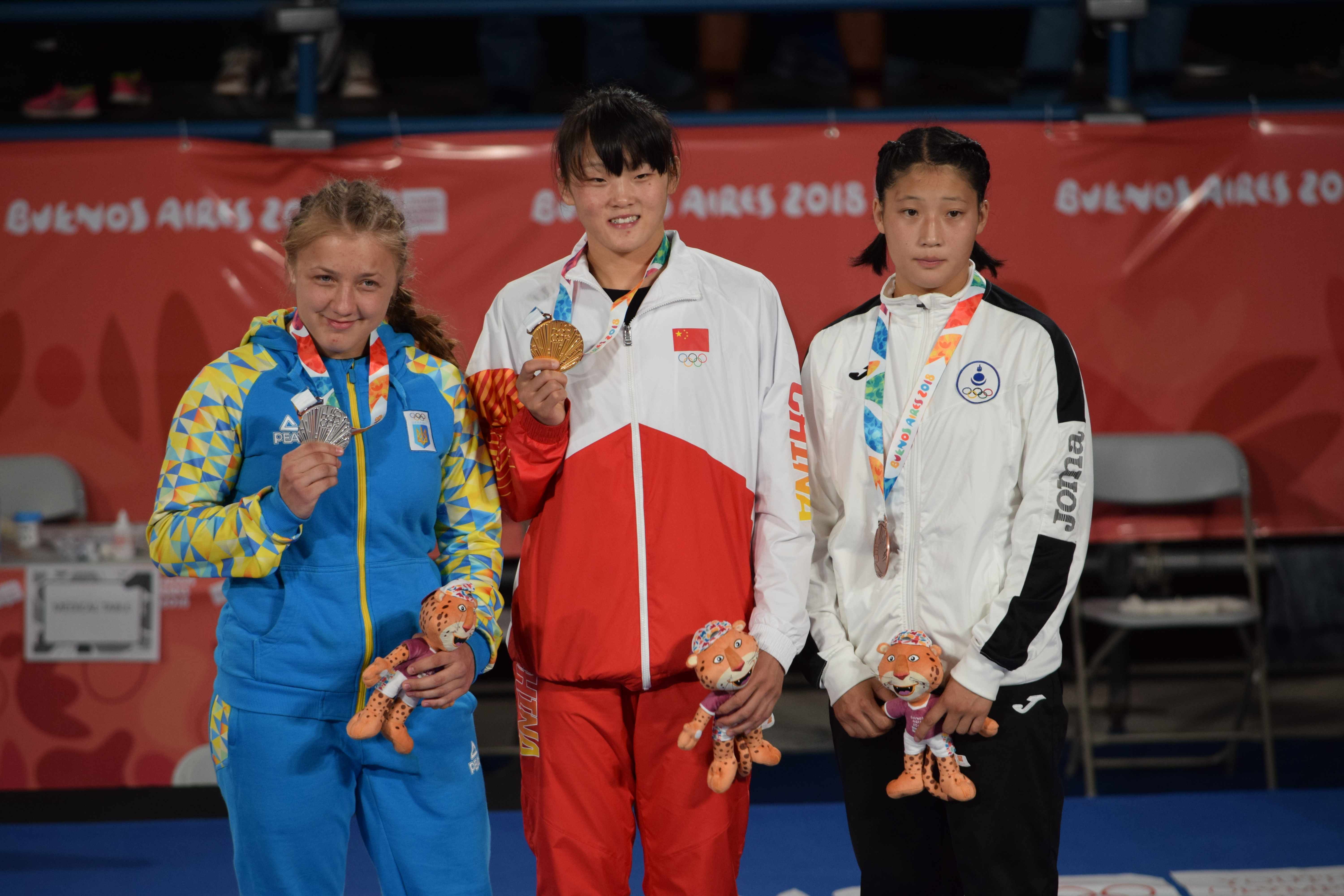 Ceremonia de premiación durante los Juegos Olímpicos de la Juventud 2018 en Buenos Aires. Noche del 13 de octubre. Xinru ZHOU, Oksana CHUDYK y Oyun-Erdene TAMIR.